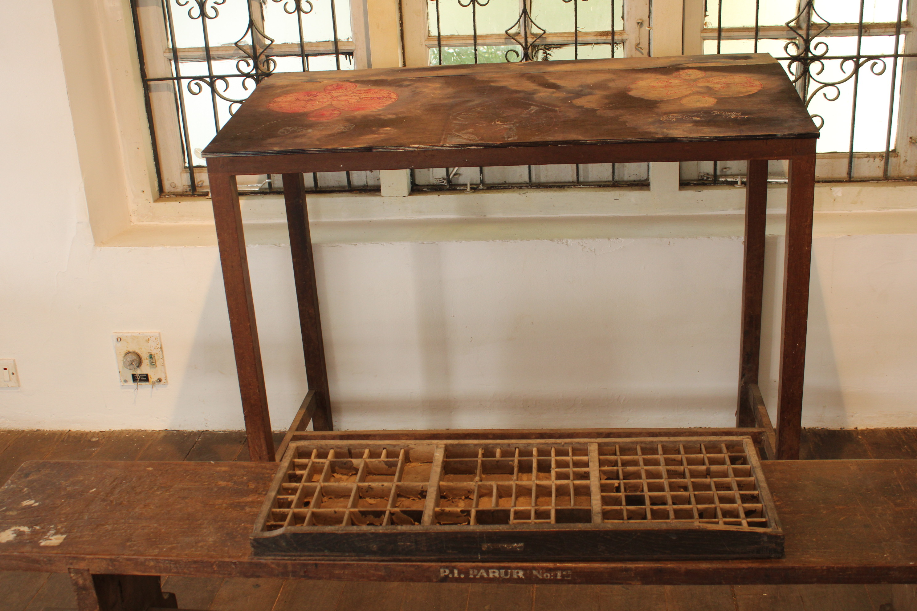 ശുഭഗി റാവുവിന്റെ കൊച്ചി മുസിരിസിലെ നാലാം പതിപ്പിലെ അവതരണം, 'റൗളിന്റെ കാഴ്ചയും വായനാമുറിയും' (ഒരു ഭാഗം)